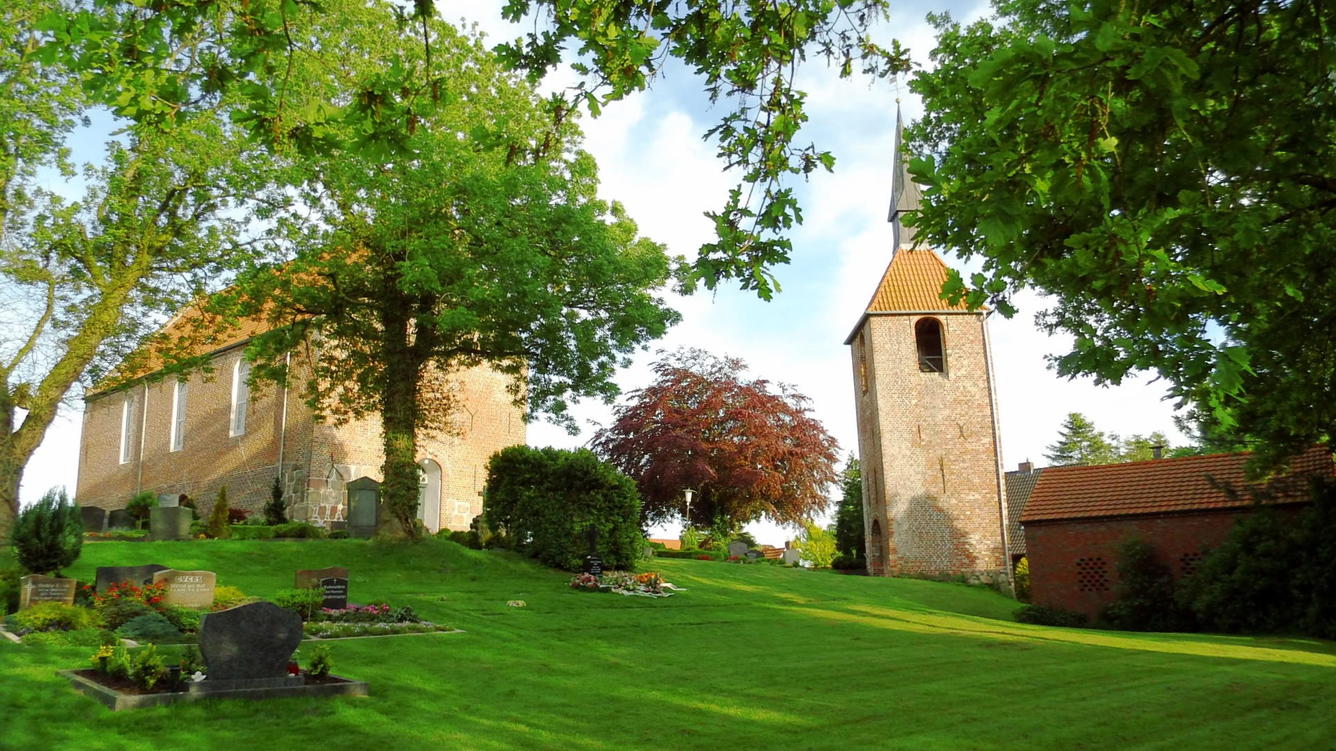 Evangelisch-lutherische St. Martinus-Kirche Etzel (Nordwestseite) in der Ortschaft Etzel, Gemeinde Friedeburg, Landkreis Wittmund, Niedersachsen, Deutschland